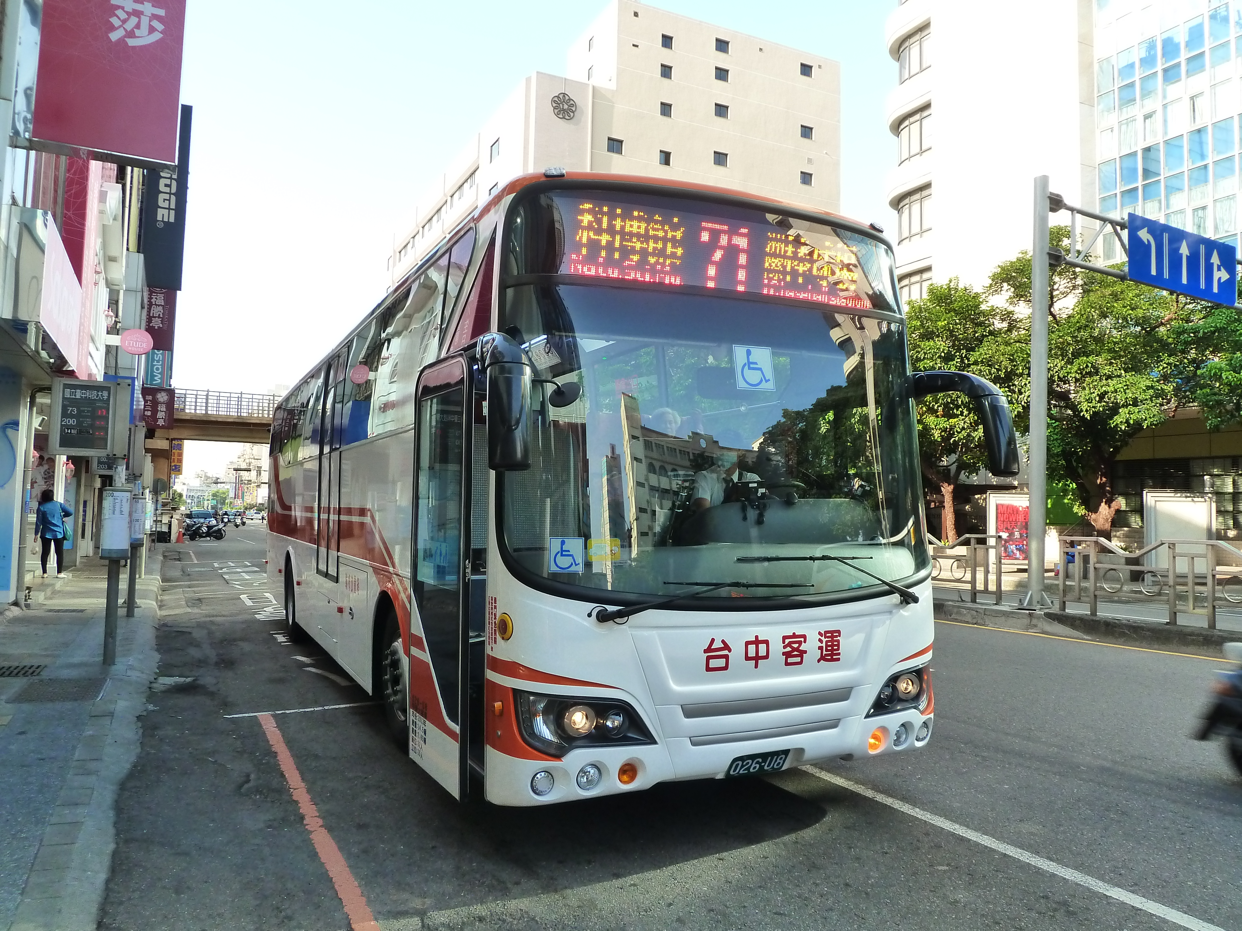 中文（台灣）: 台中客運日野RK8JRVA-KJF大客車026-U8營運台中市公車71路，停靠國立台中科技大學；本車與台中客運同型車023-U8、025-U8，為臺灣第一批通用無障礙大客車。